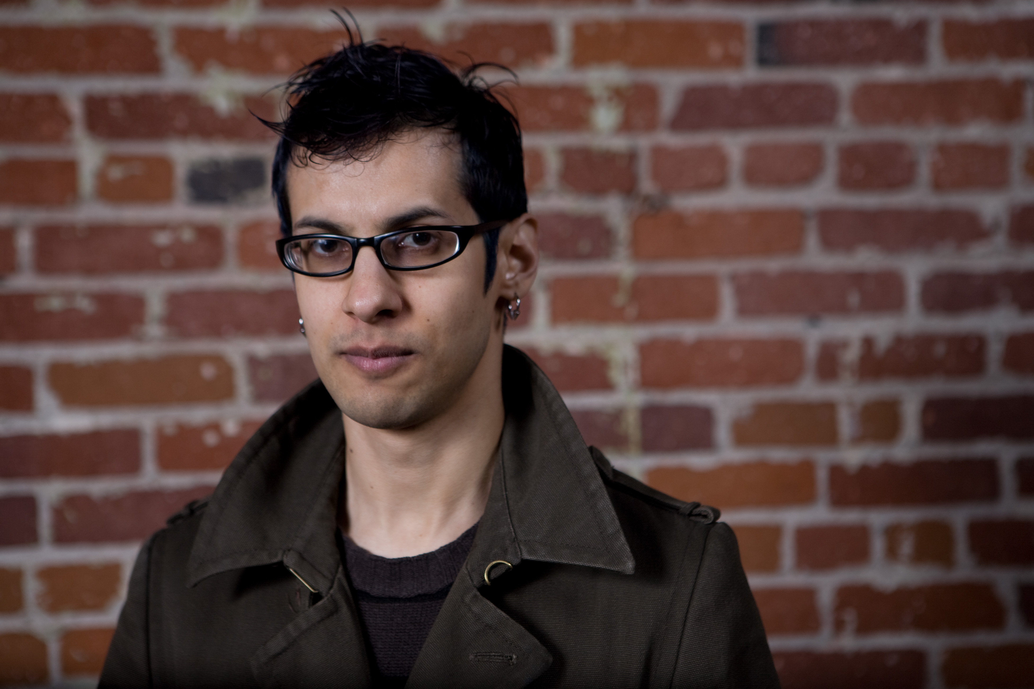 Los Angeles cartoonist Jhonen Vasquez.